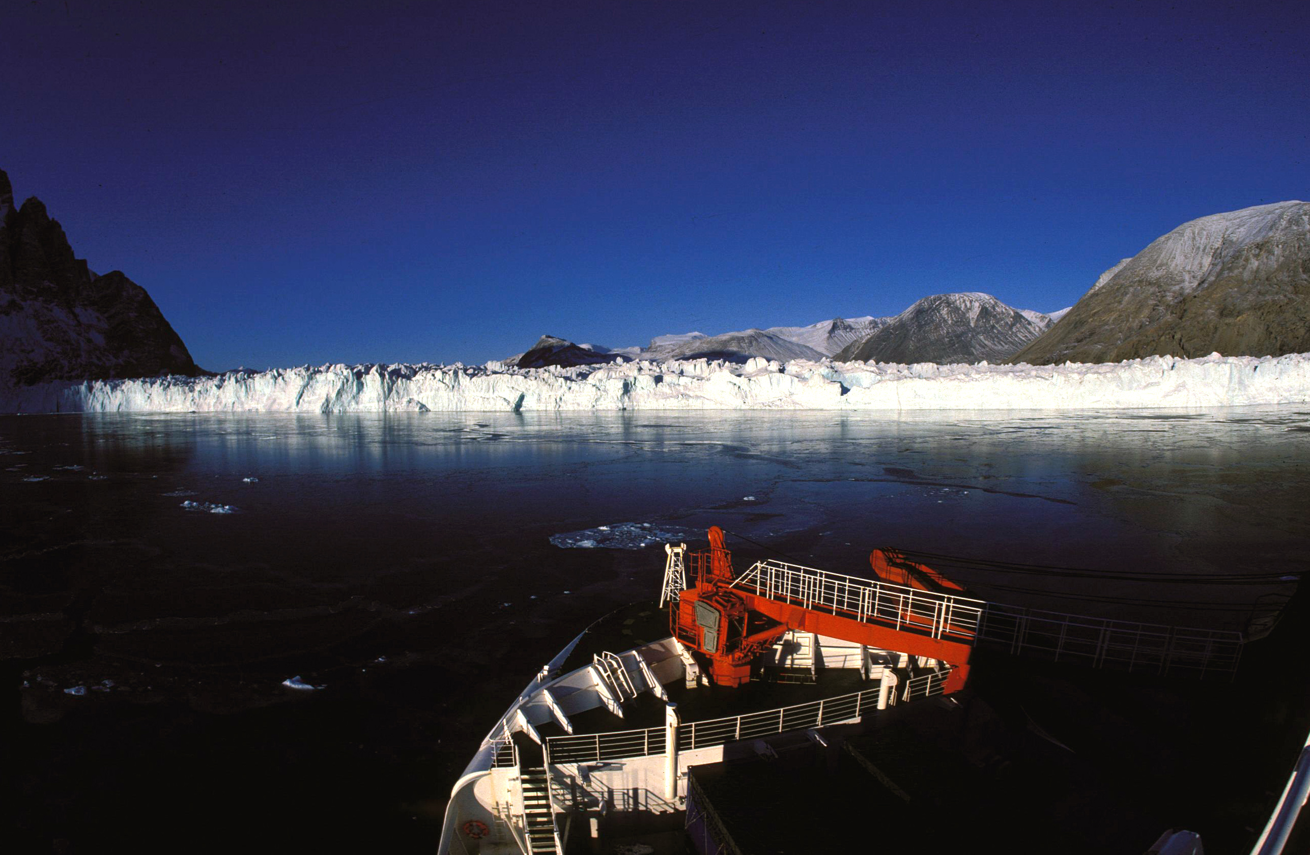 Daugaard-Jensen Glacier, feeding into Nordvestfjord, Greenland (view from research vessel POLARSTERN during cruise ARK-VII/3)